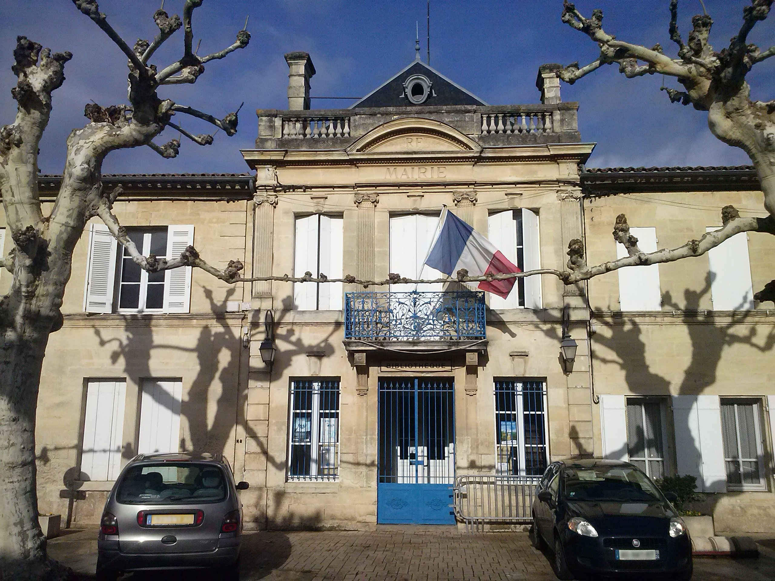 Mairie de Sainte-Terre